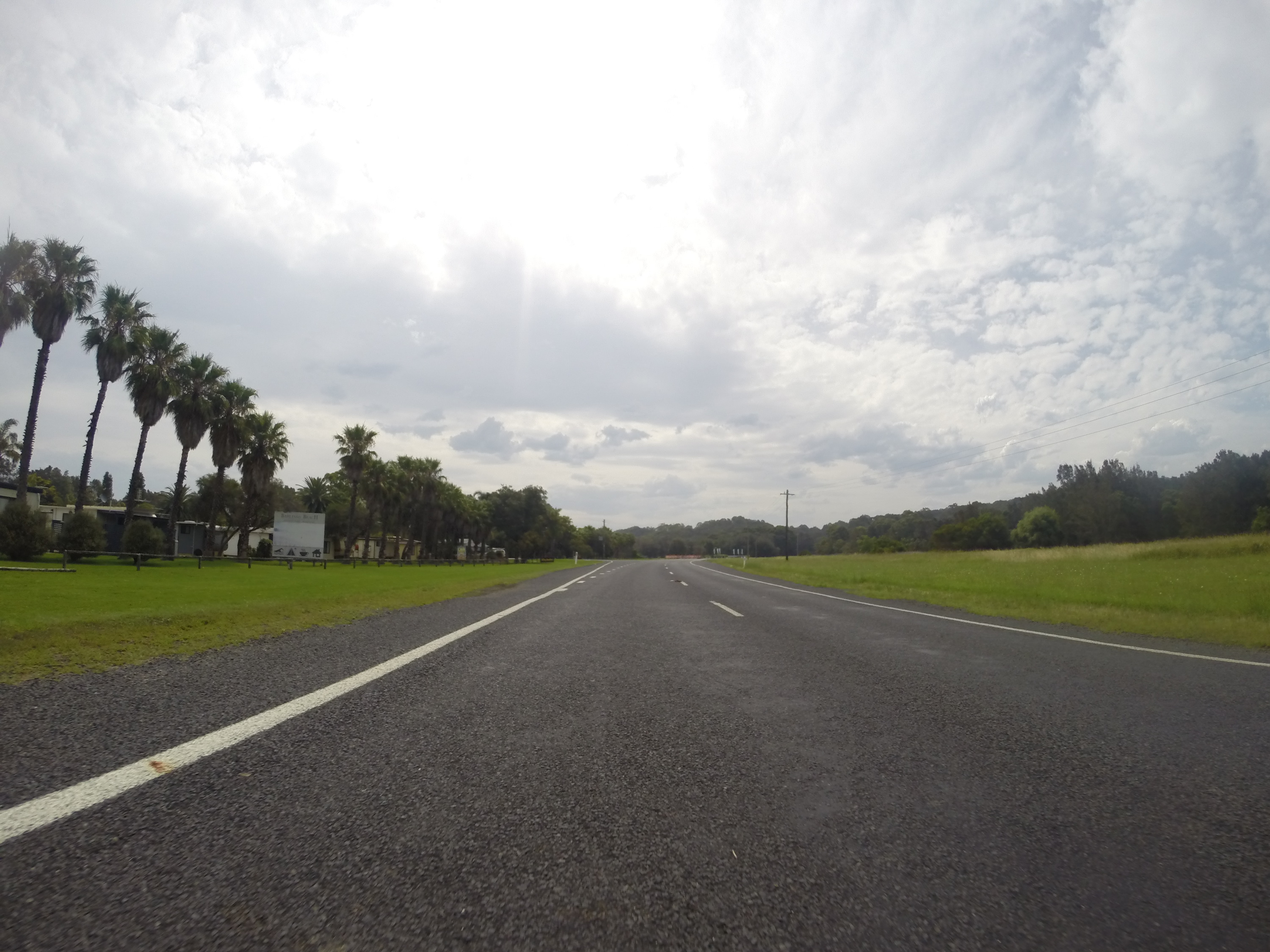 Tomakin NSW 2537, Australia